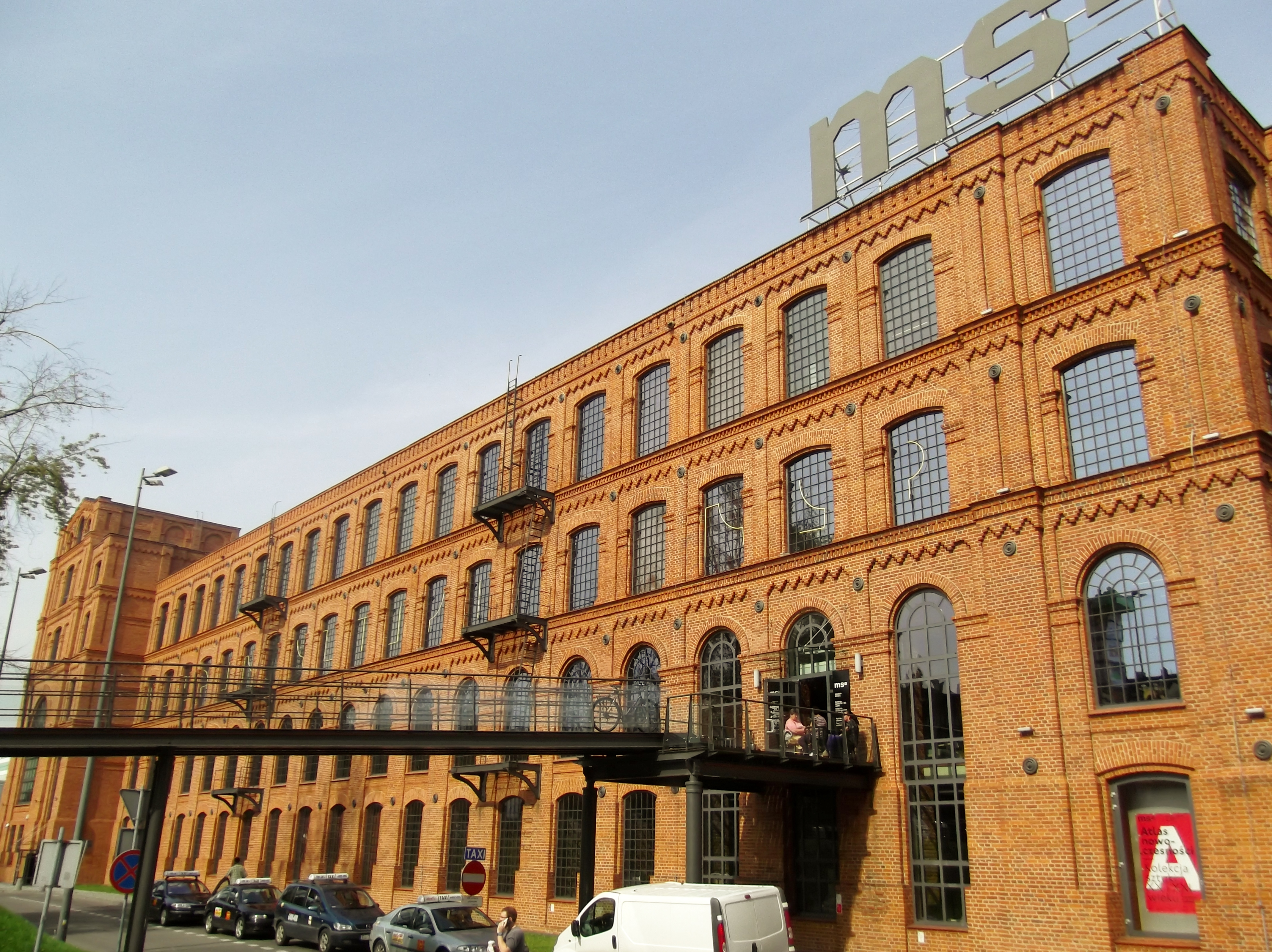 Łódź, tkalnia wysoka (ob. ms2), 1895